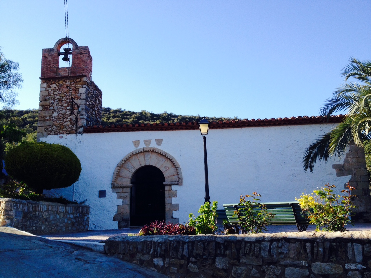 Església de Sant Joan Baptista, a Les Ventalles.